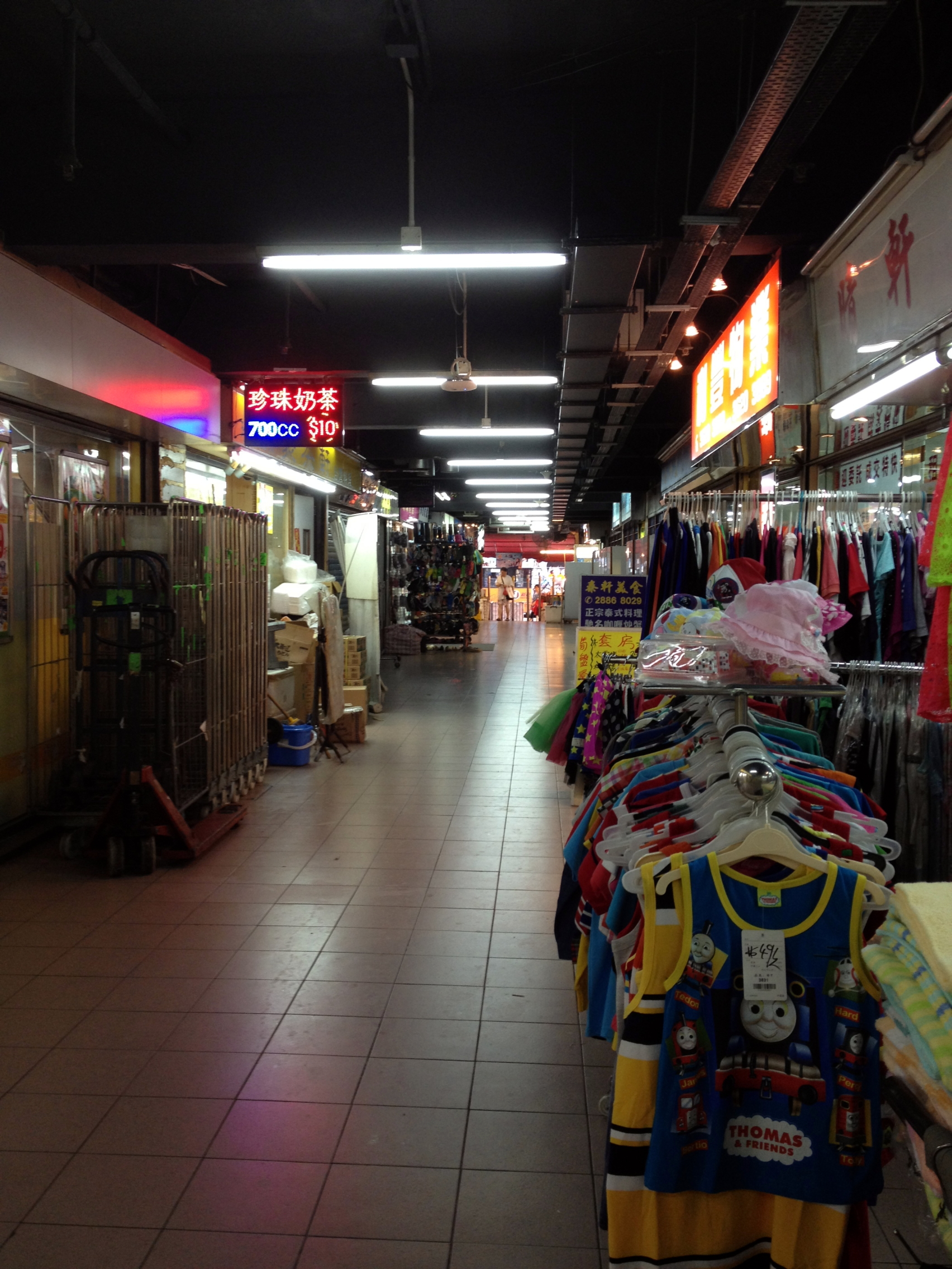 Tai On Building